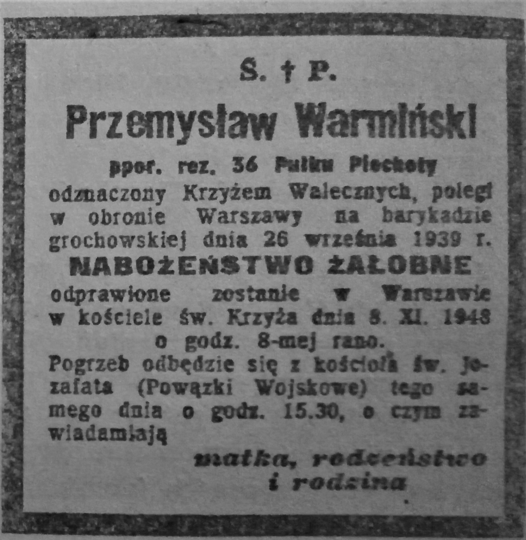 Ogłoszenie w Tygodniku Powszechnym z 7.11.1948 r. o nabożeństwie za ppor. Przemysława Warmińskiego.